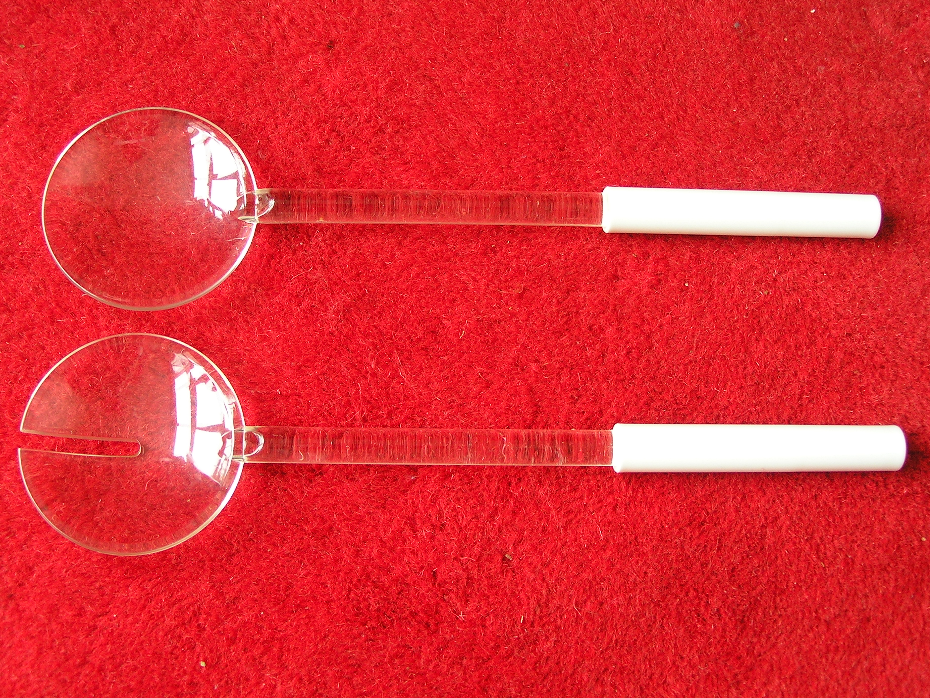 Slacouvert